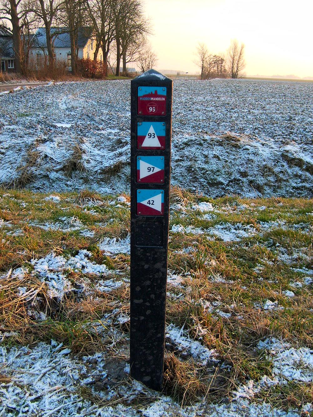 Knooppuntpaal Waddenwandelen. Een wandelnetwerk langs de kust van de provincies Groningen, Frieslad, Noord-Holland, inclusief de Waddeneilanden en het Duitse eiland Borkum. Foto gemaakt bij Oldenzijl.